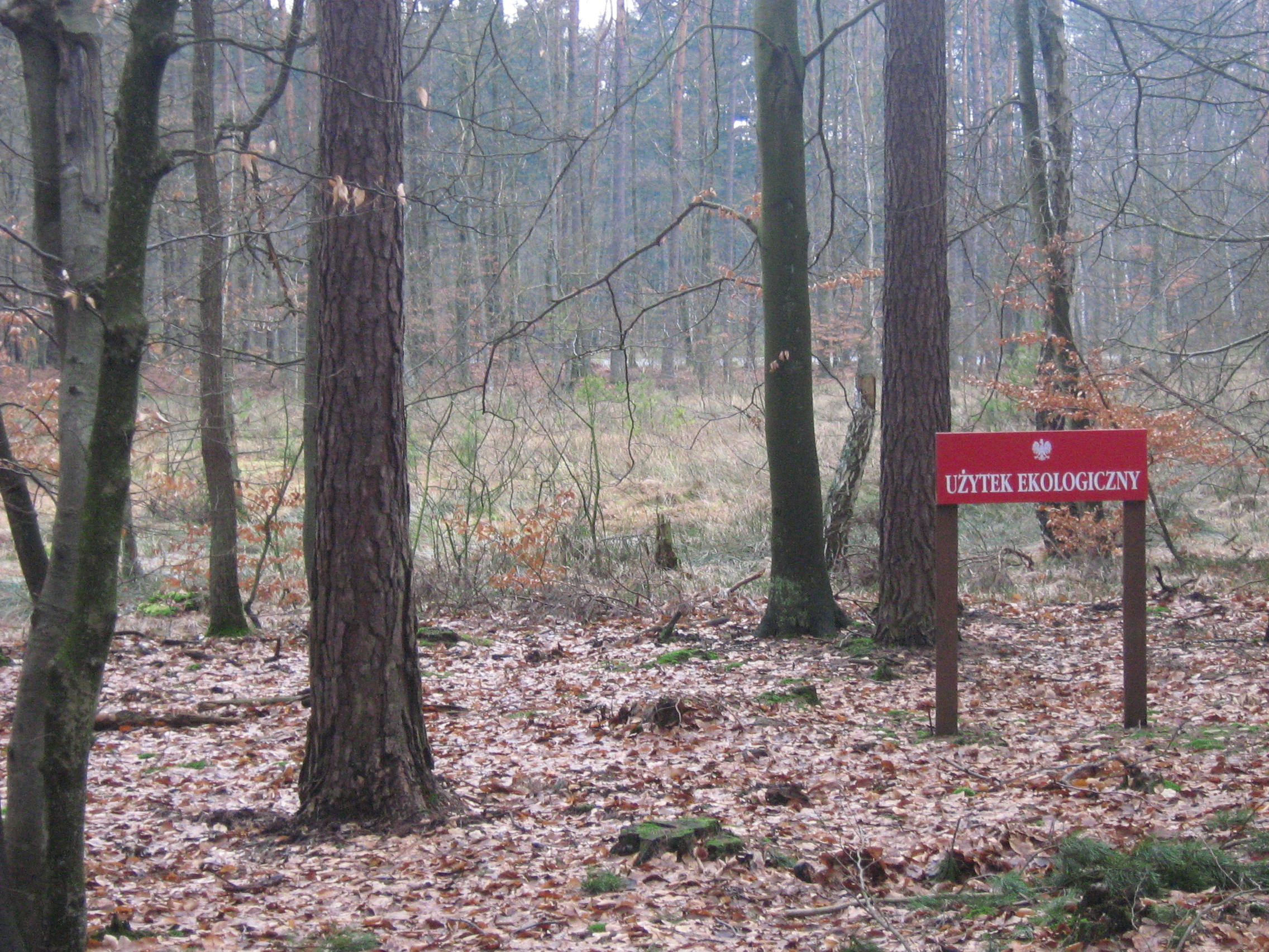 Las Golczewski